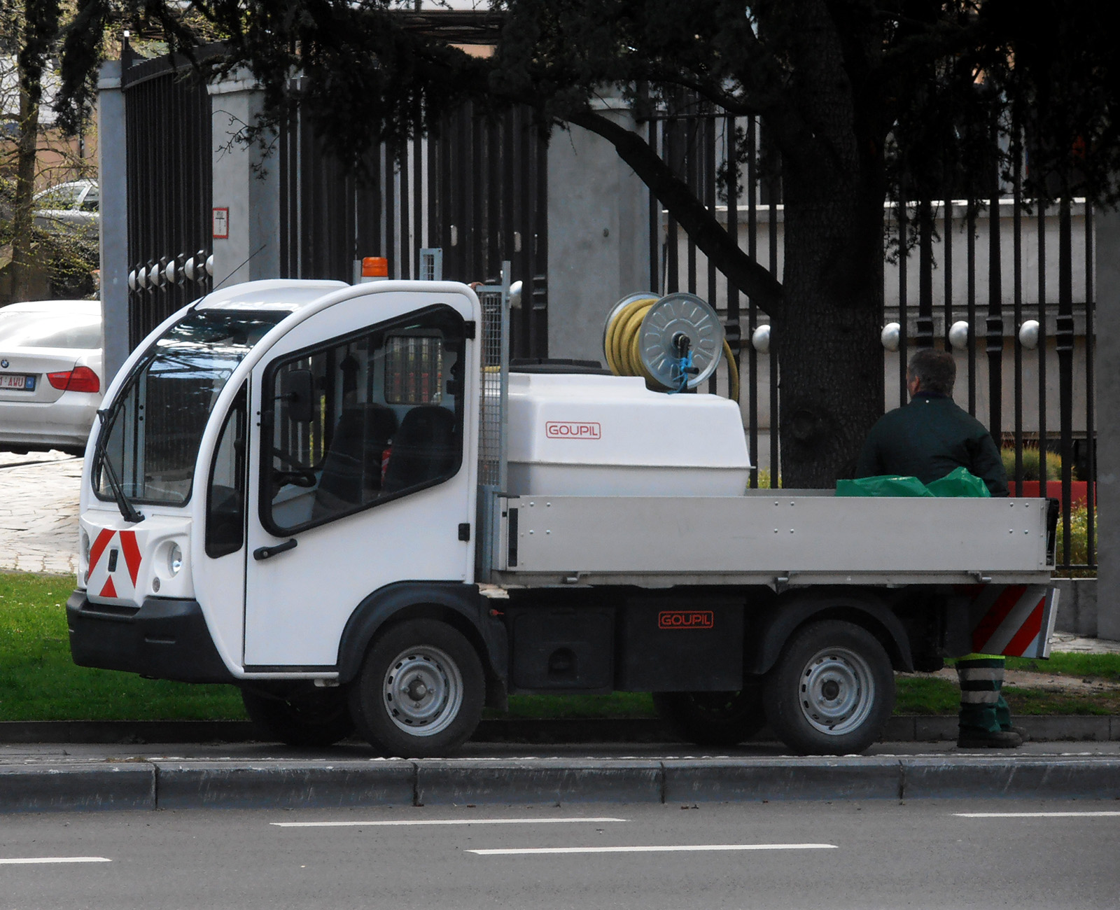 Goupil (Franse elektrische wagen)